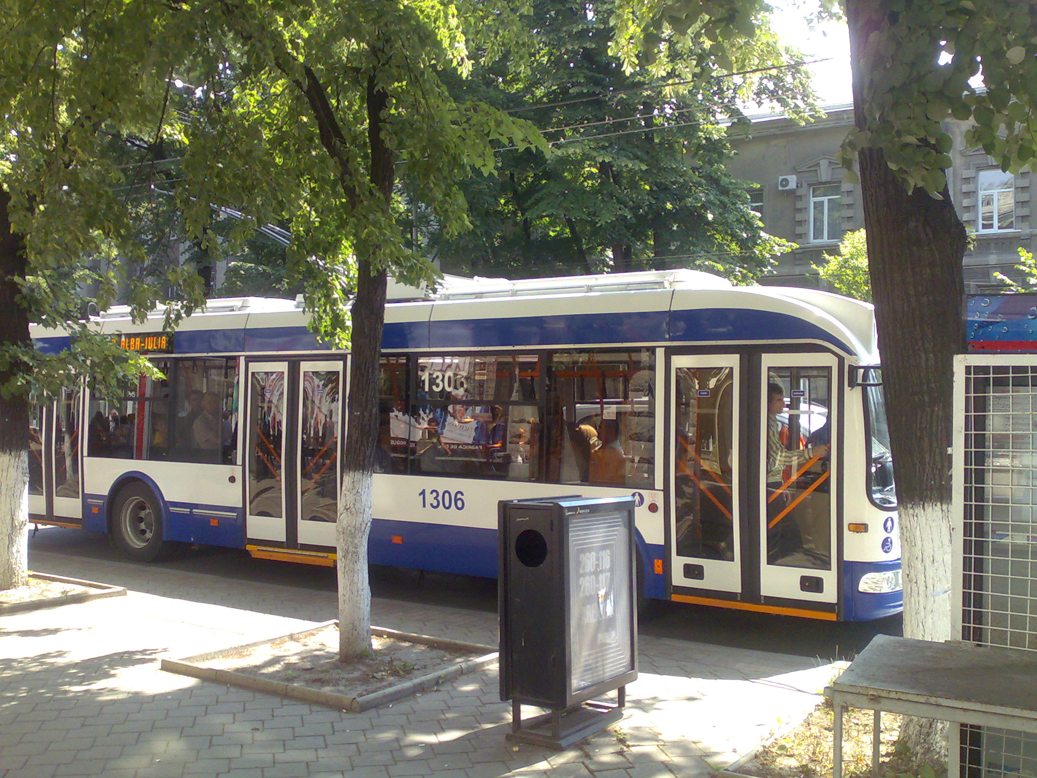 Троллейбус БКМ на проспекте Штефана чел Маре